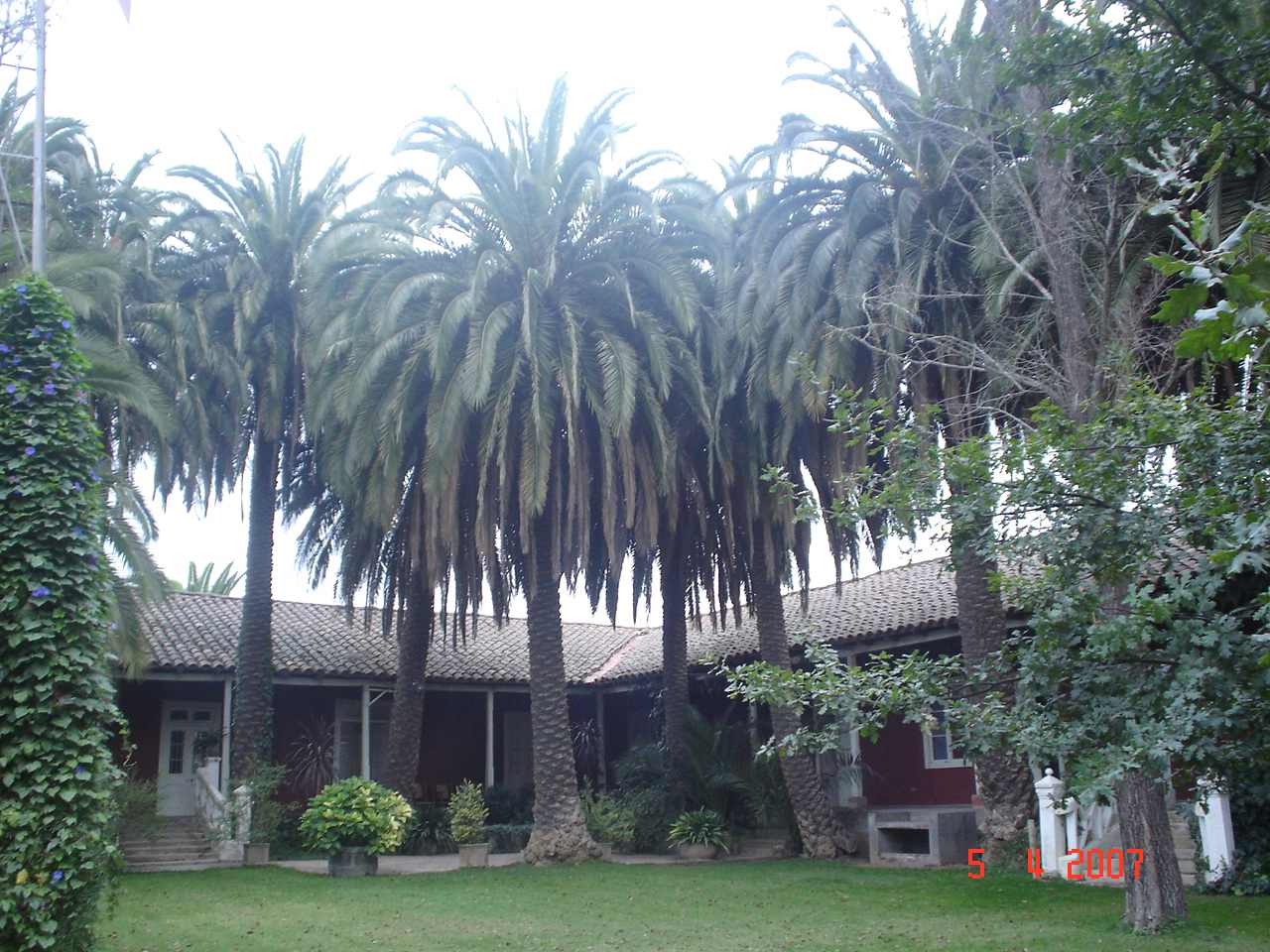 Quiahue